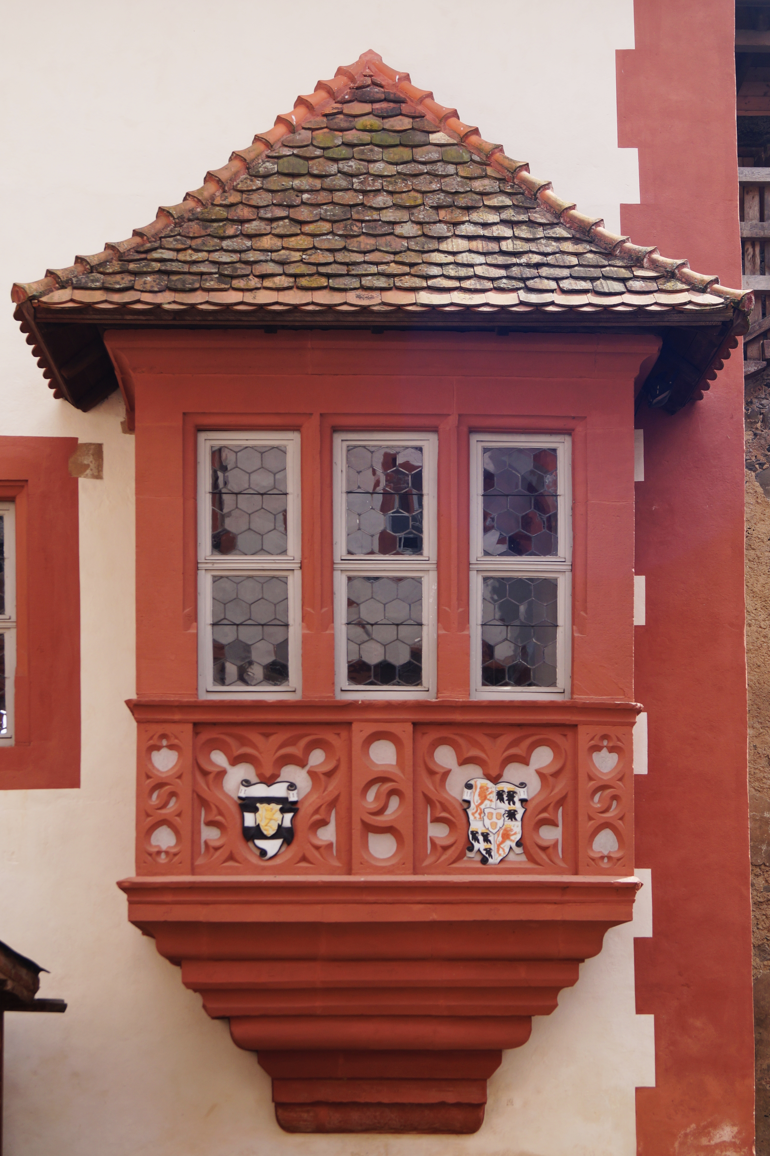 Burg Ronneburg, Hessen, renaissancezeitlicher Hängeerker am Zinzendorfbau. Daran angebracht die Wappen des Grafen Heinrich von Ysenburg-Ronneburg und seiner ersten Gemahlin Maria von Rappoltstein.